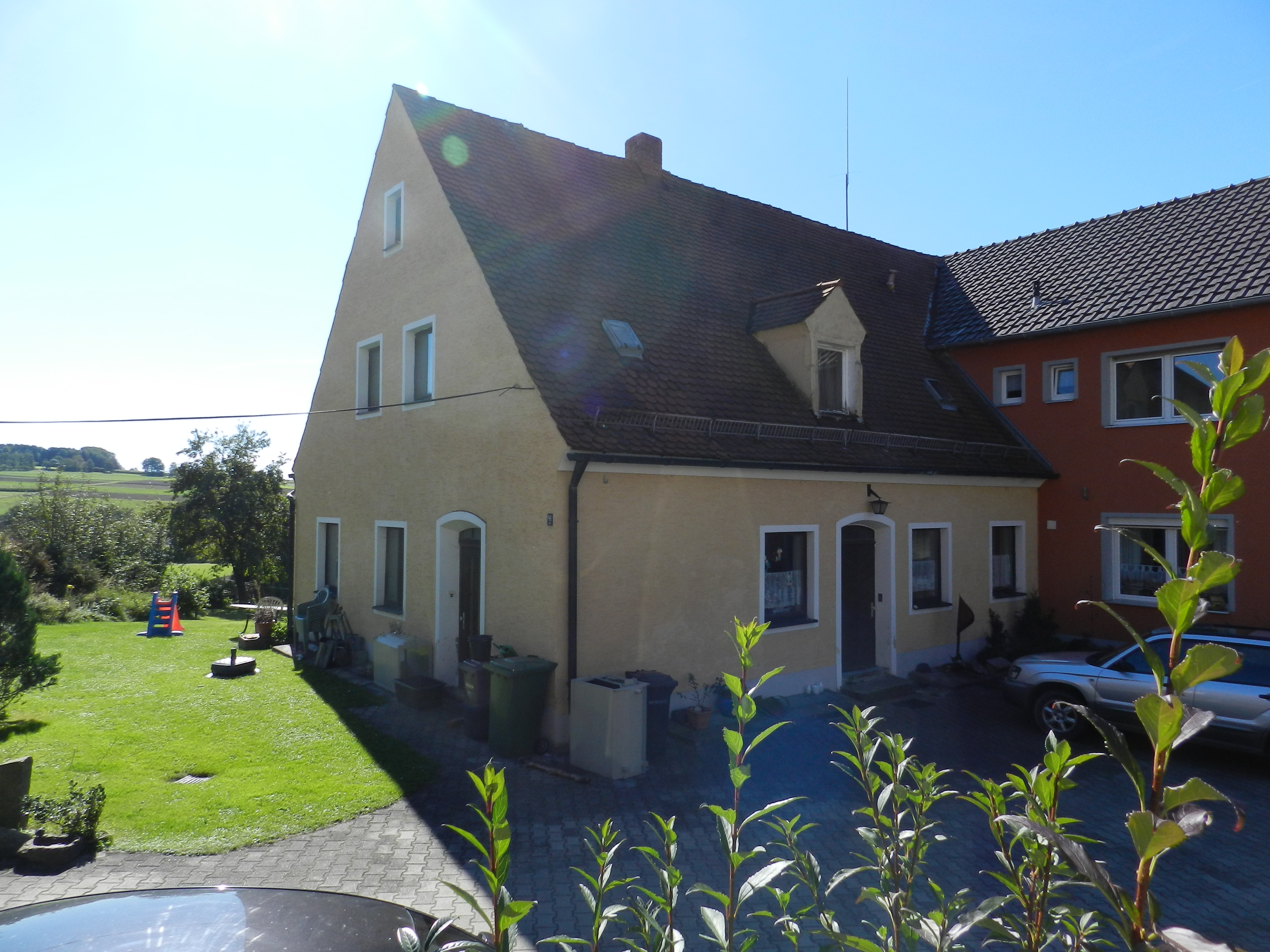 Altes Schulhaus in Kühried (links); wurde später als Näherei genutzt und ist heute zu einem Wohnhaus umgebaut; Gemeinde Teunz, Landkreis Schwandorf, Oberpfalz, Bayern (2011)